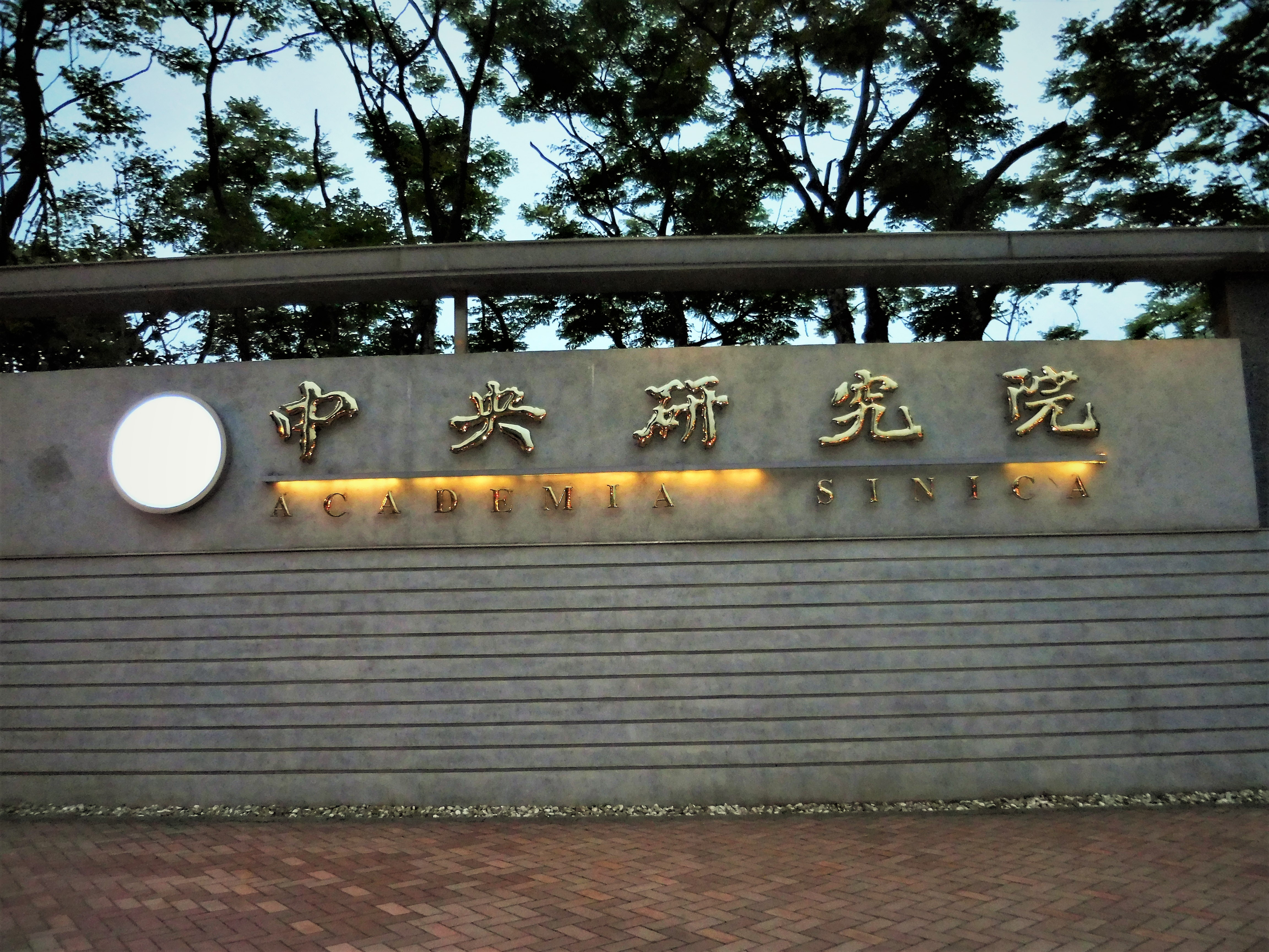 中央研究院